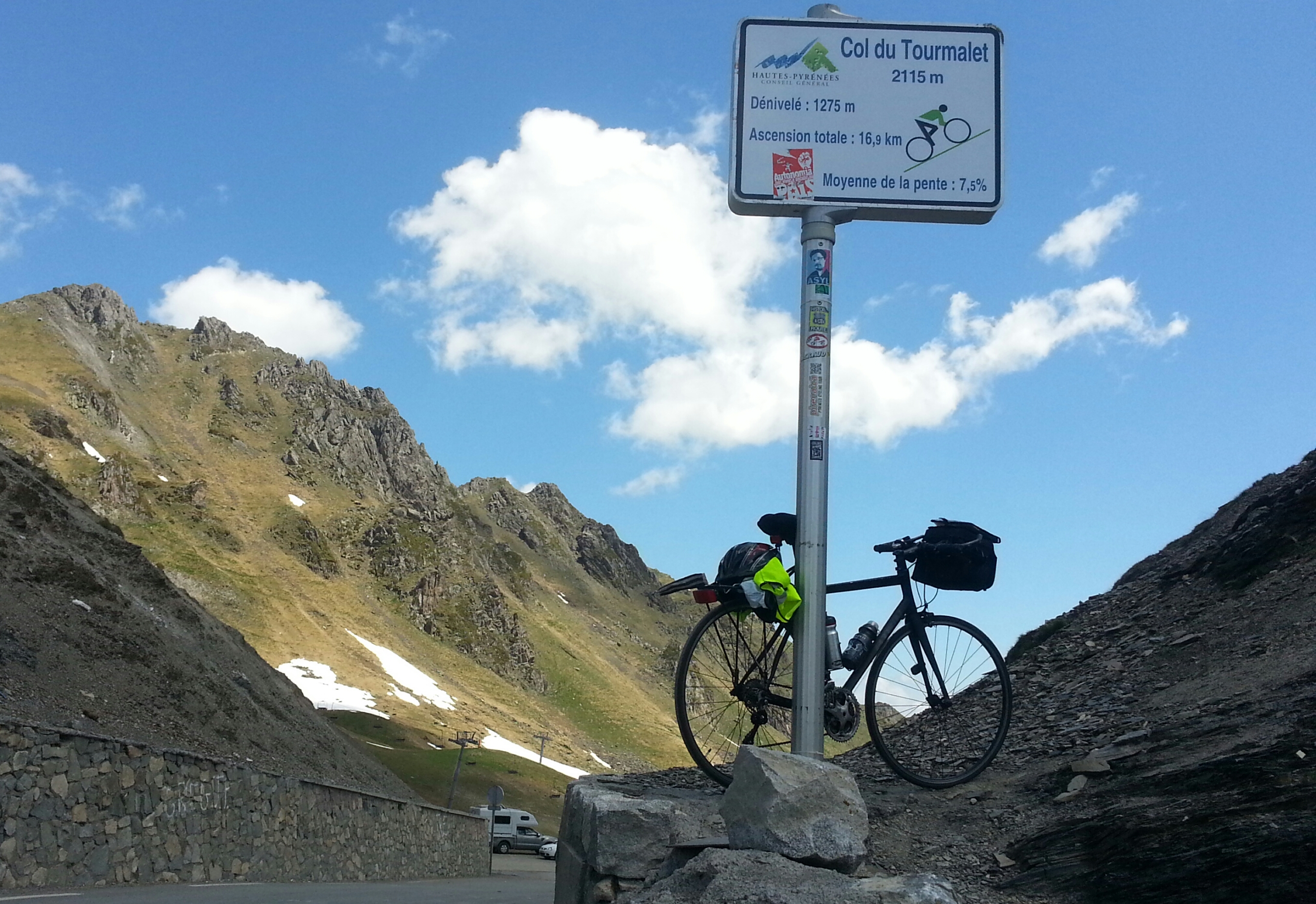 Au col du Tourmalet !